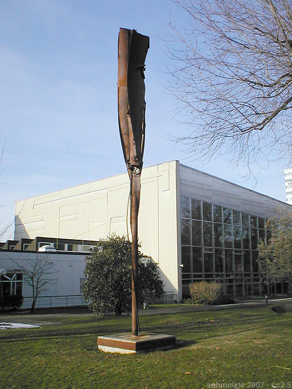 Friedensstele im Stadtgarten in Heilbronn, im Hintergrund die „Harmonie“.